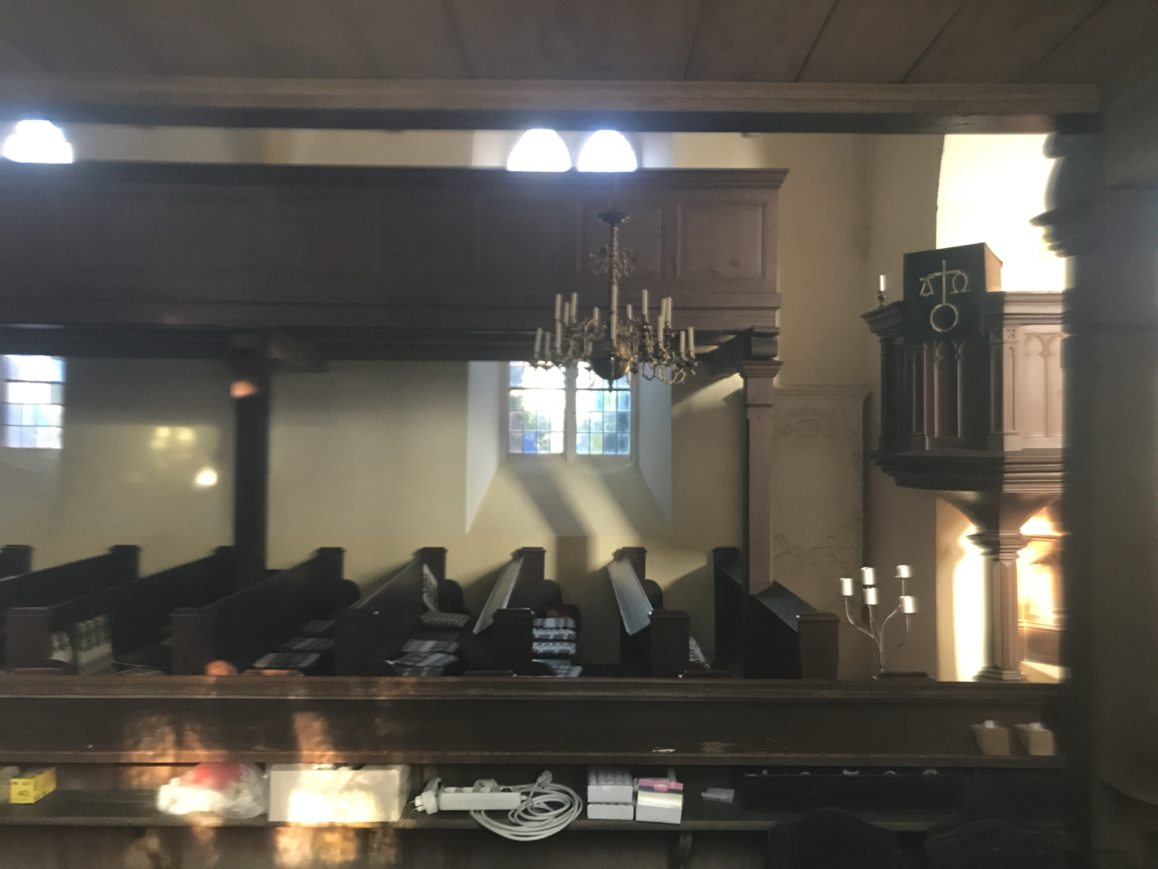 Die Dorfkirche Wahlsdorf ist eine spätromanische Feldsteinkirche aus der ersten Hälfte des 13. Jahrhunderts in Wahlsdorf, einem Ortsteil von Dahme/Mark in Brandenburg. Die Kirchenausstattung ist neugotisch.